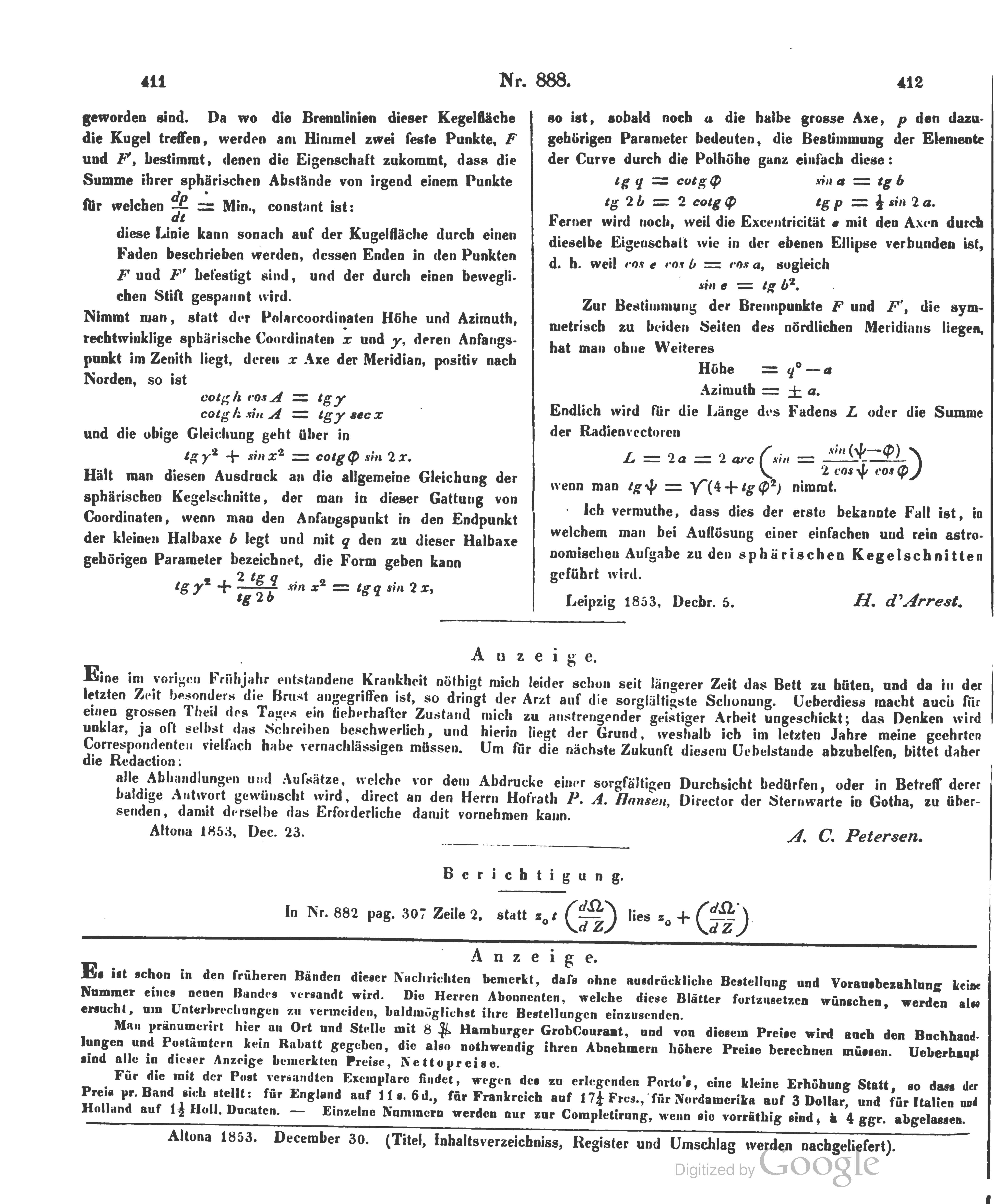 Anzeige [von Adolph Cornelius Petersens Krankheit], Astronomische Nachrichten, Band 37, 1854, Spalte 411–412.